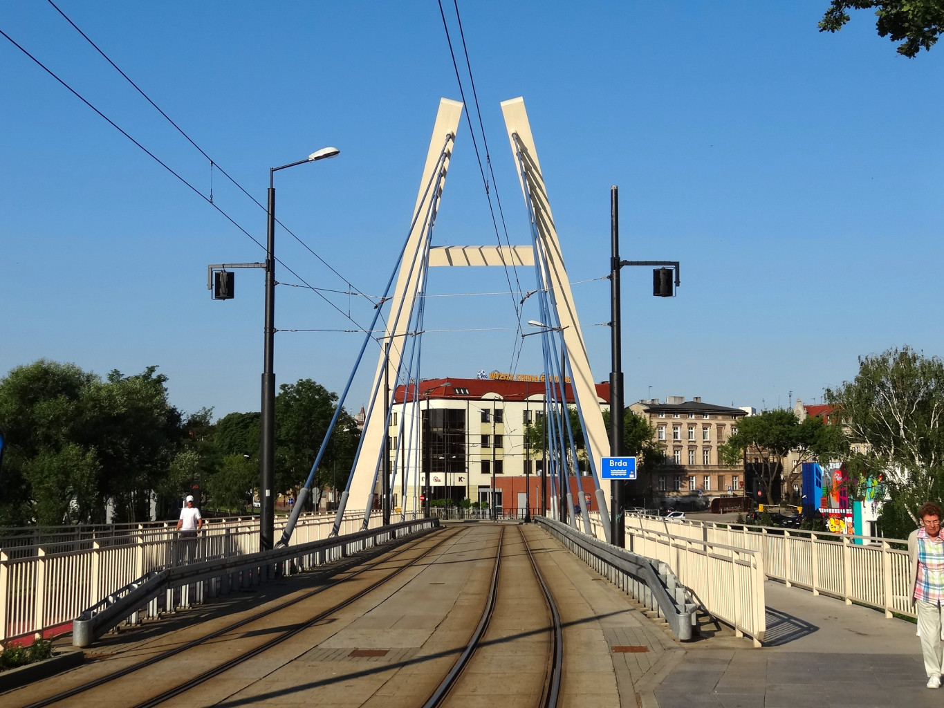 Most tramwajowy im. Władysława Jagiełły nad Brdą w Bydgoszczy